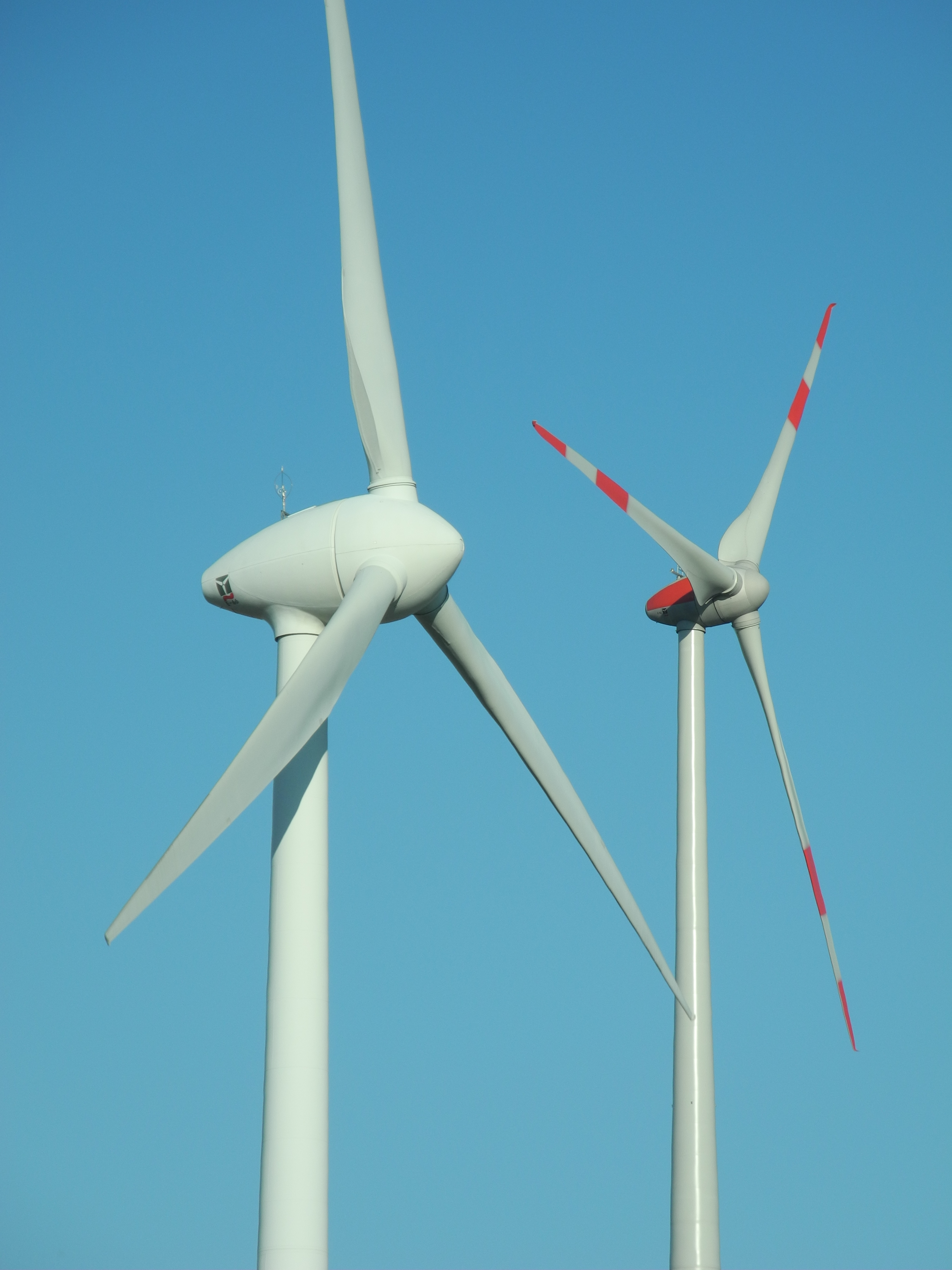 Windkraftanlagen